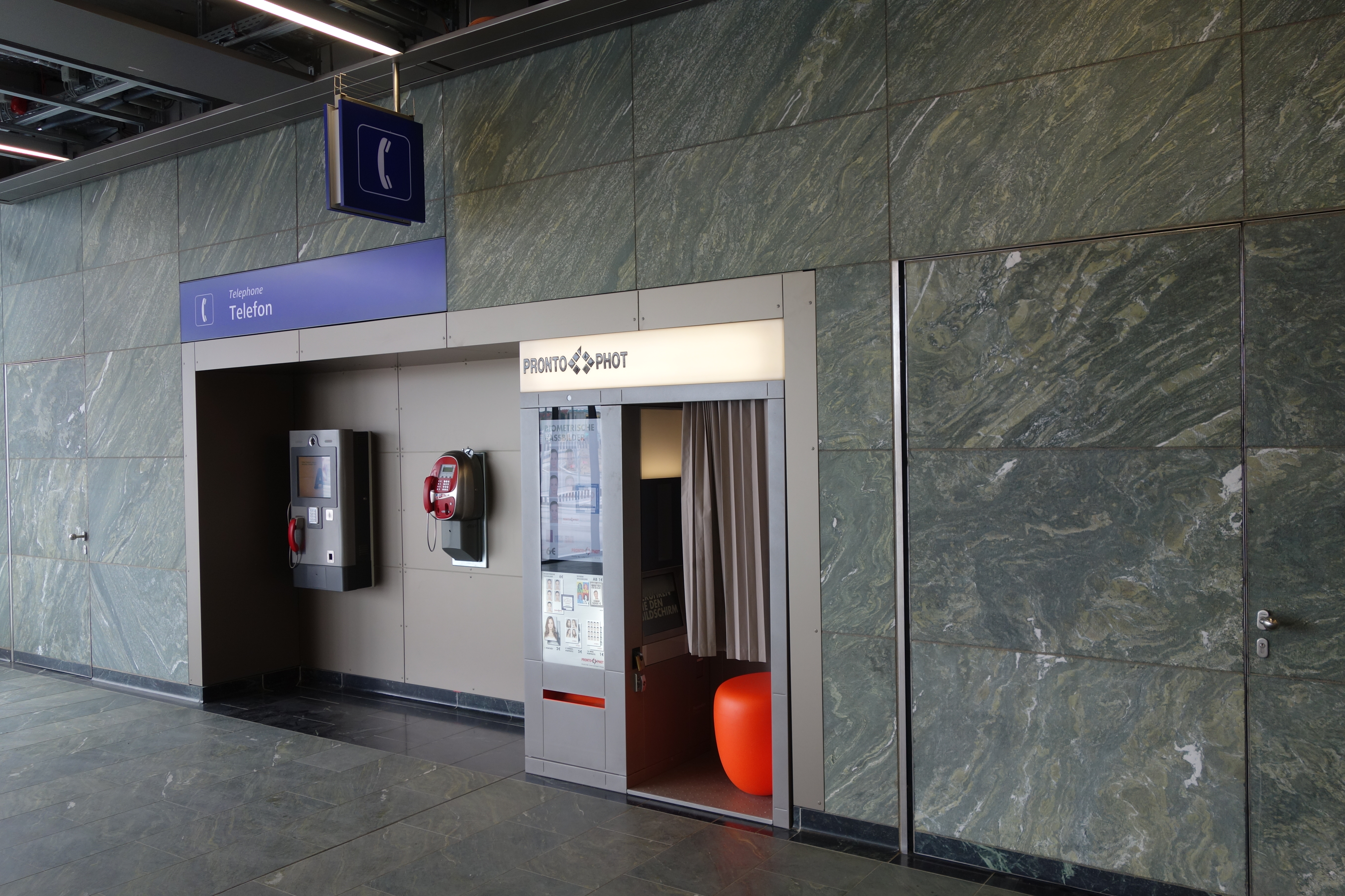 Wandausschnitt am Wiener Hauptbahnhof im Juni 2014. Wand- und Bodenbereiche wurden mit Serpentinit Gestein in "Tauerngrün" belegt. Türen und Einbauten sind in die Wände integriert. Der Bahnhof war zum Zeitpunkt der Aufnahme lediglich in Teilbetrieb, die Anlagen daher noch nicht fertiggestellt.